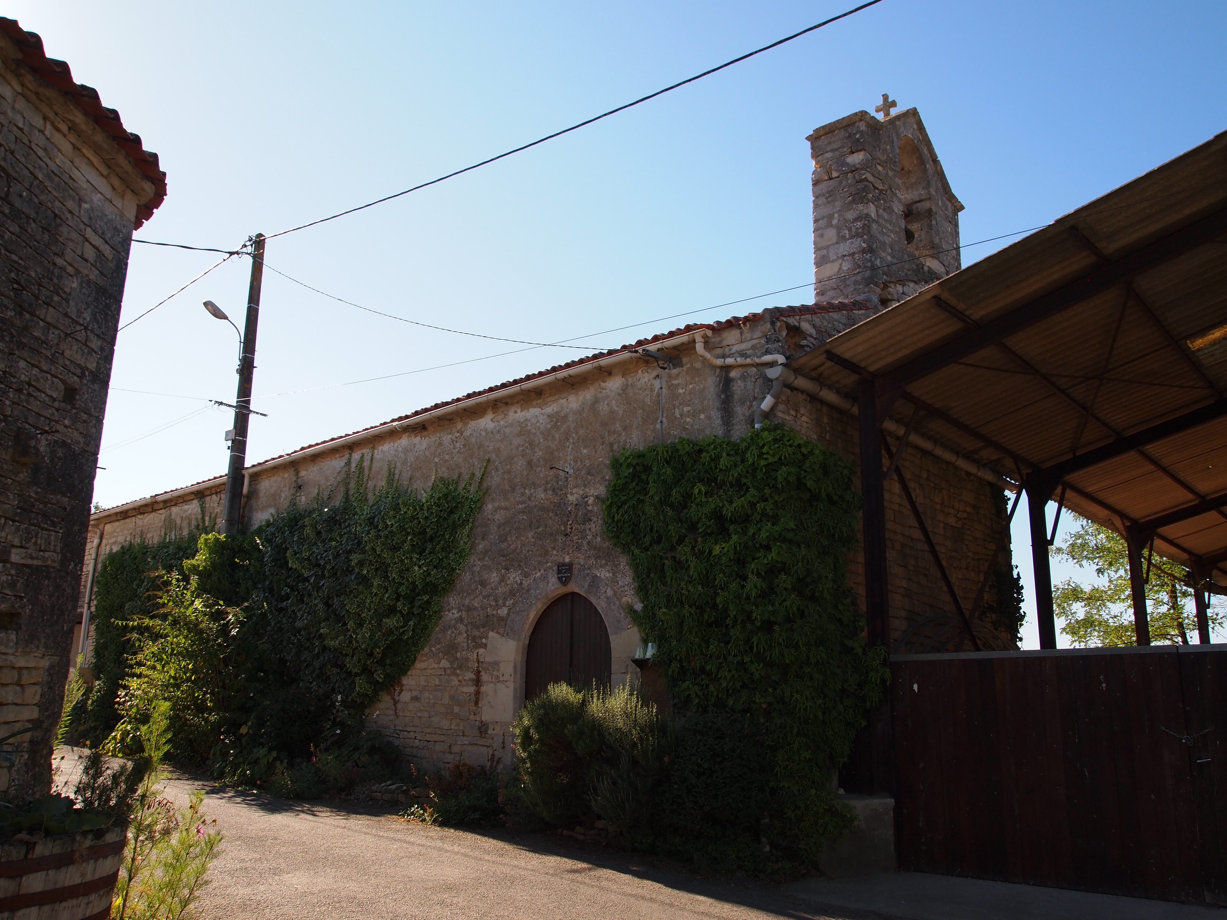 Église de Cellettes, en Charente. L'arrière et le clocher.